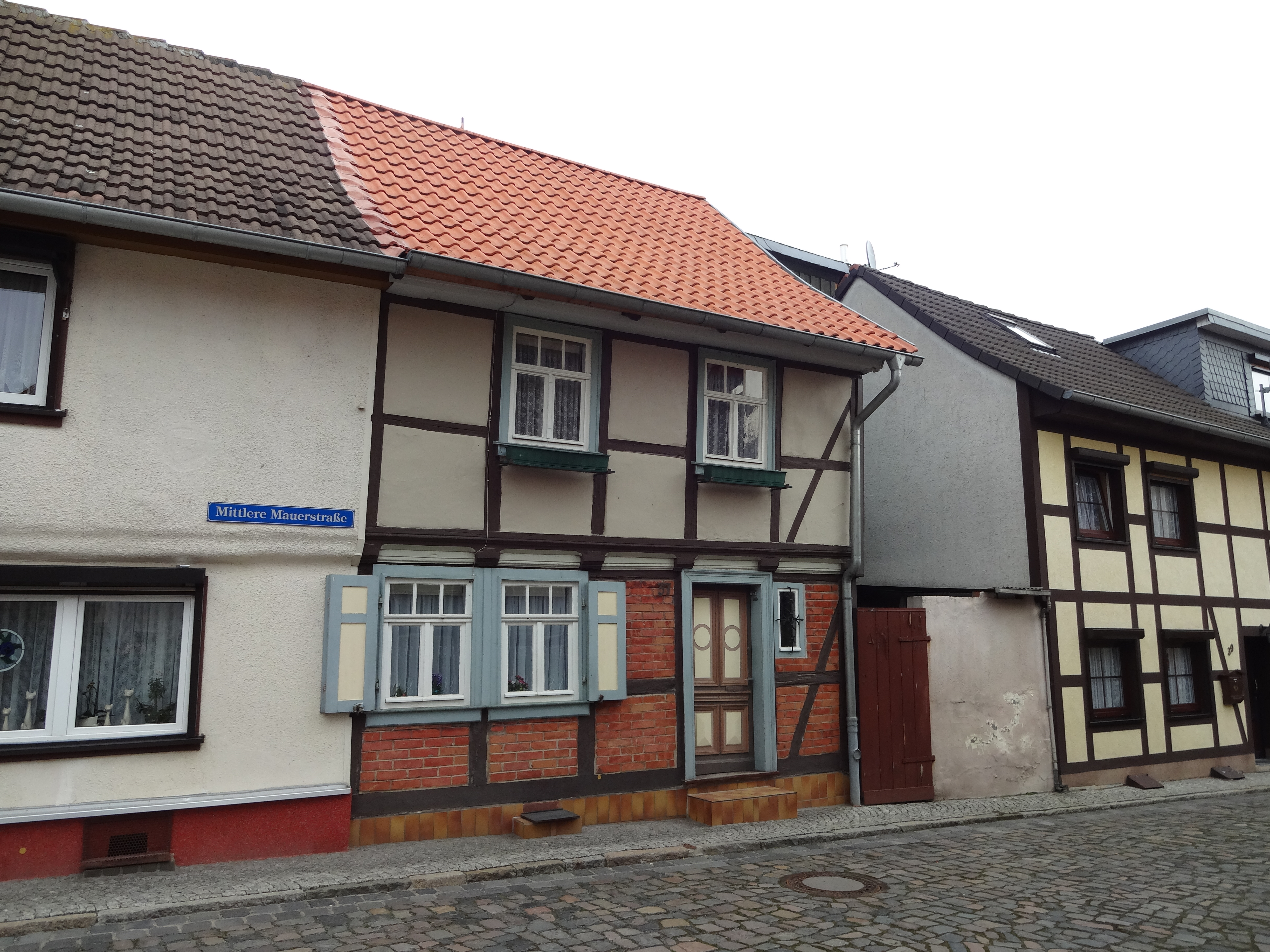 Kulturdenkmal Mittlere Mauerstraße 37 in Derenburg